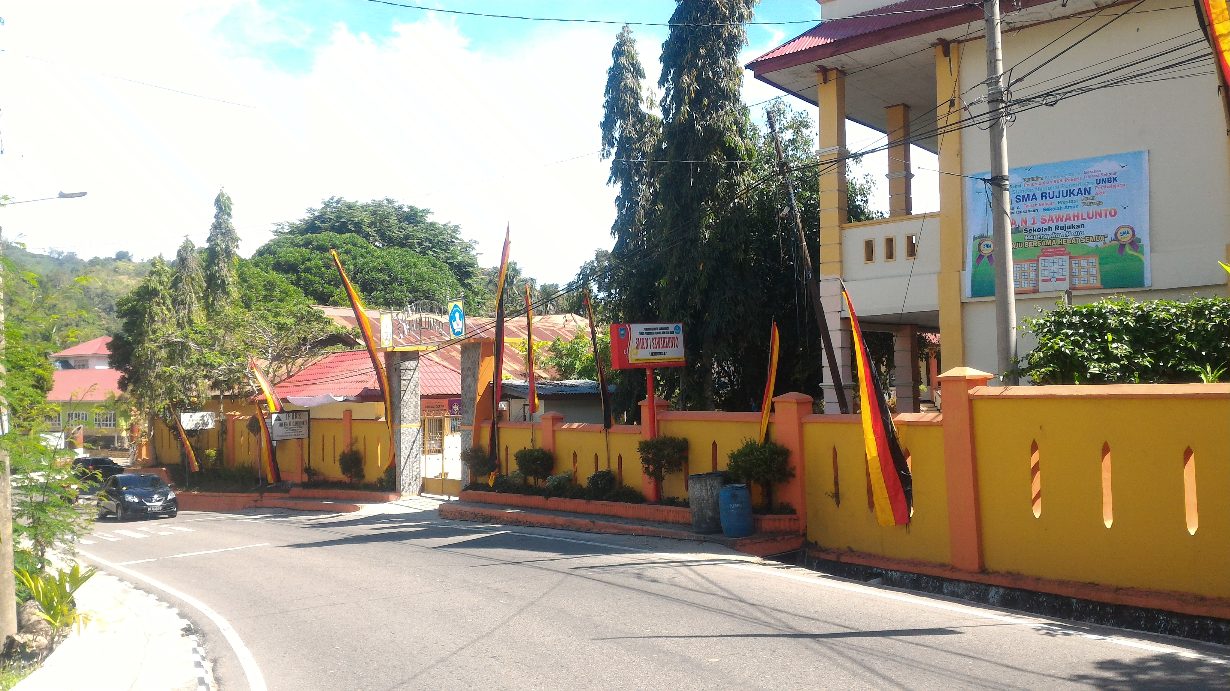 Gerbang SMA Negeri 1 Sawahlunto pada Tahun 2016 dari sisi atas.